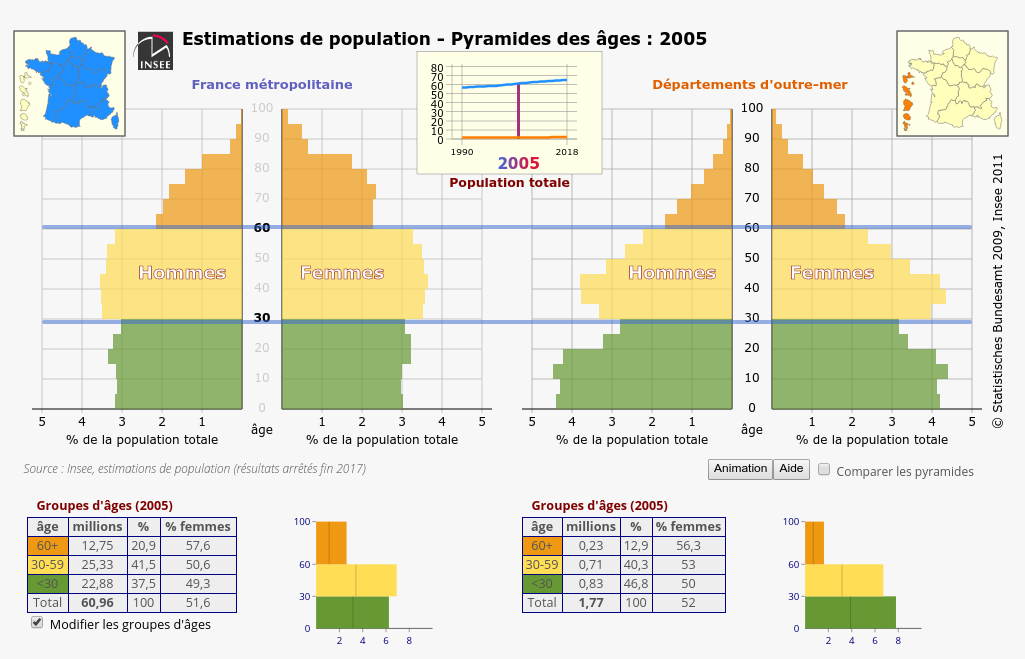 Début «Papy boom» france